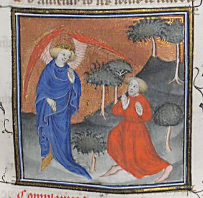 Iluminura Amour et amant de La Louange des Dames das obras completas de Guillaume de Machaut